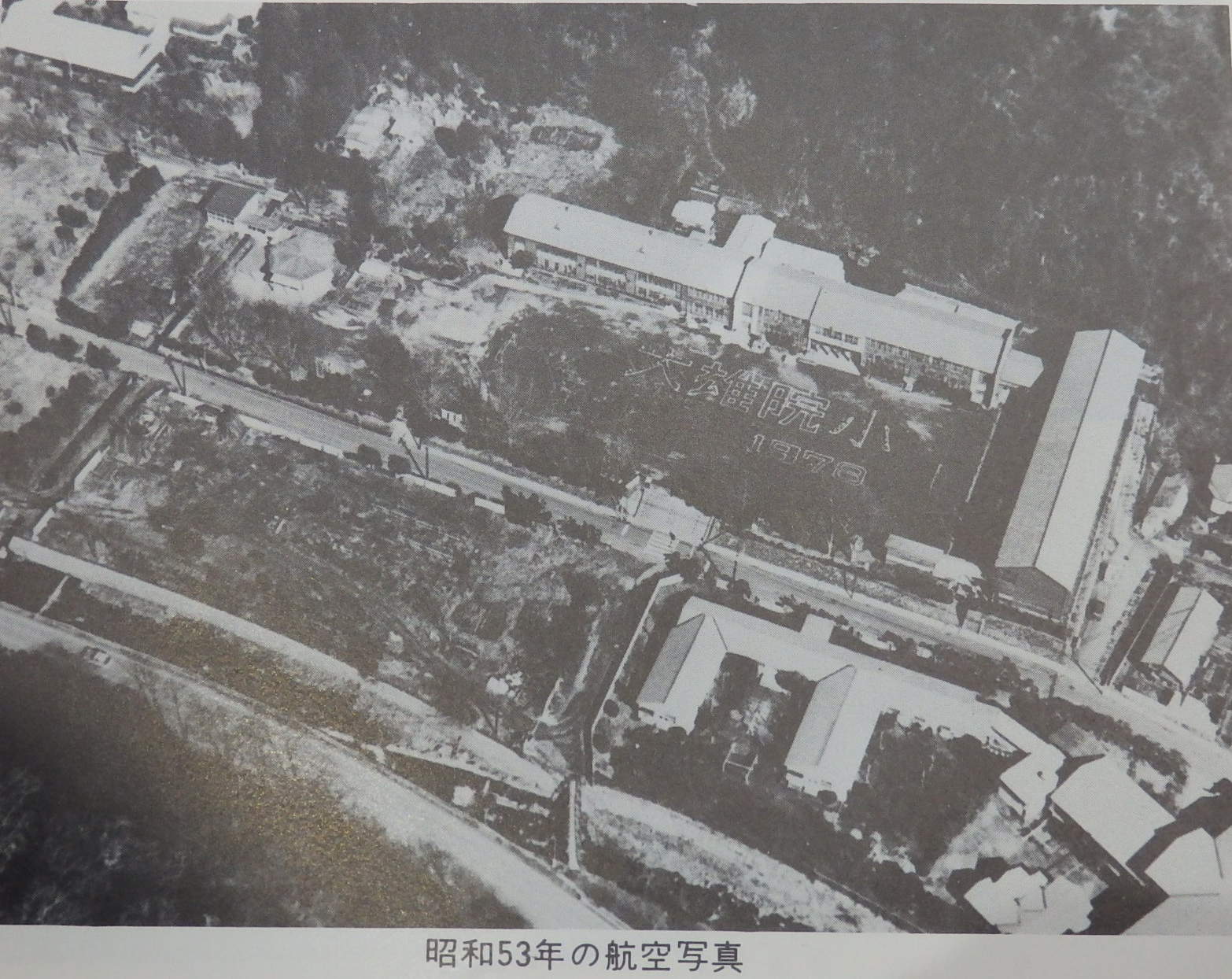 昭和53年の航空写真